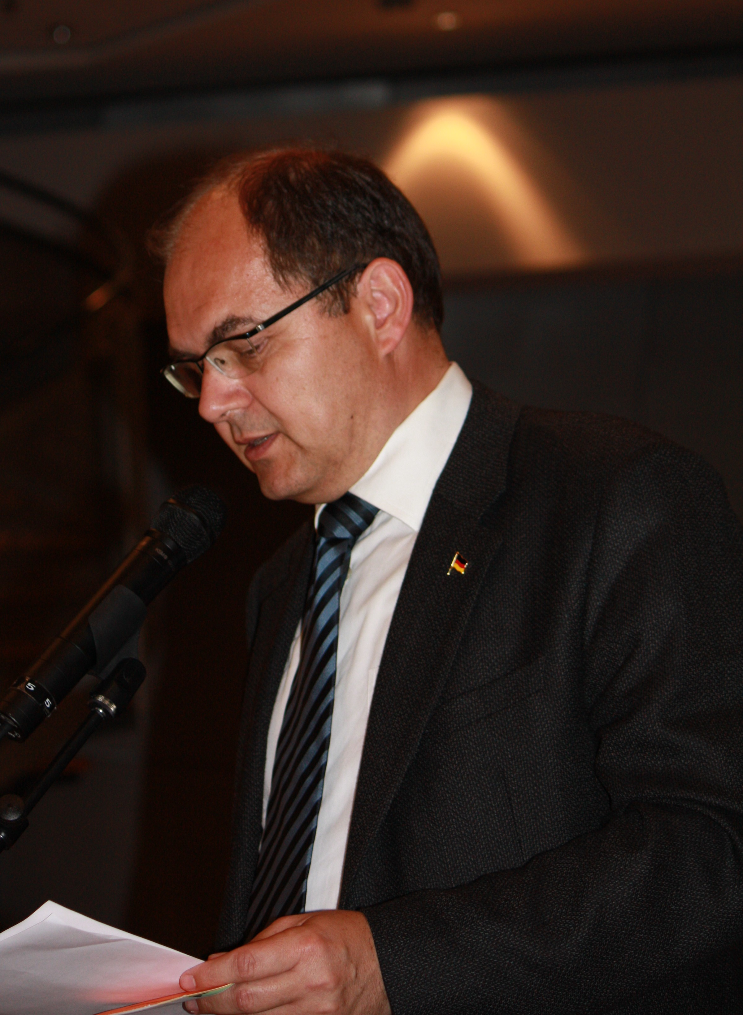 Parlamentarischer Staatssekretär im Bundesverteidigungsministerium Christian Schmidt (CSU)